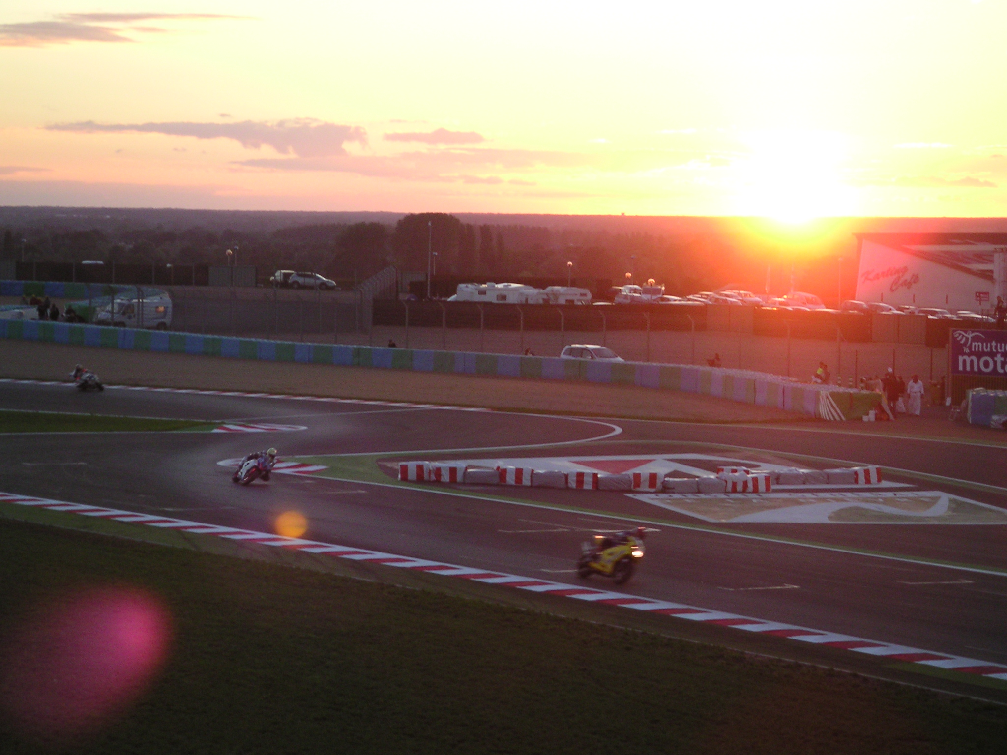 Course du Bol d'Or 2005, 24H d'endurance sur un circuit exigeant